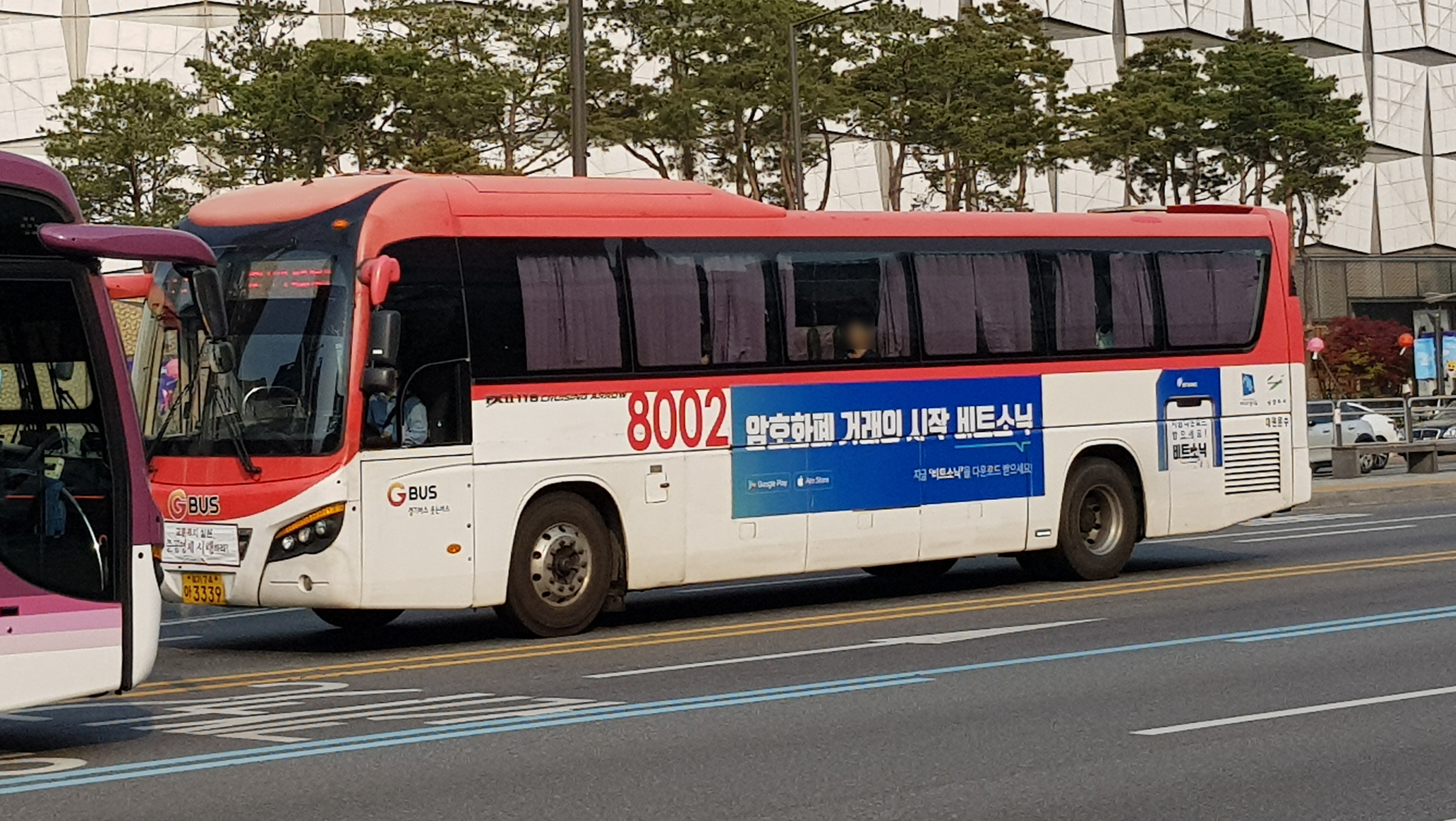 대원운수에서 운행하는 남양주시 직행좌석버스 8002번